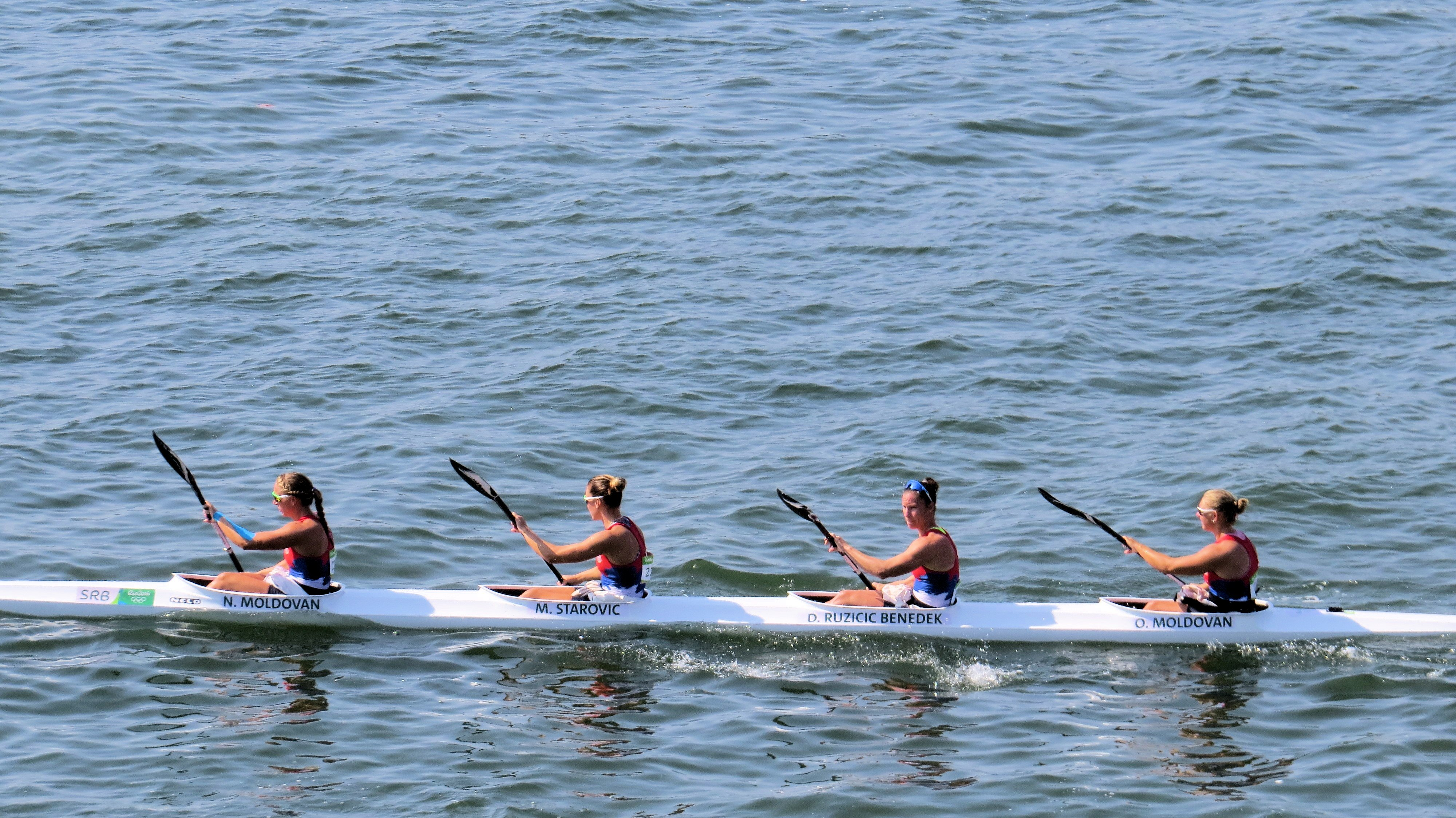 Sx50